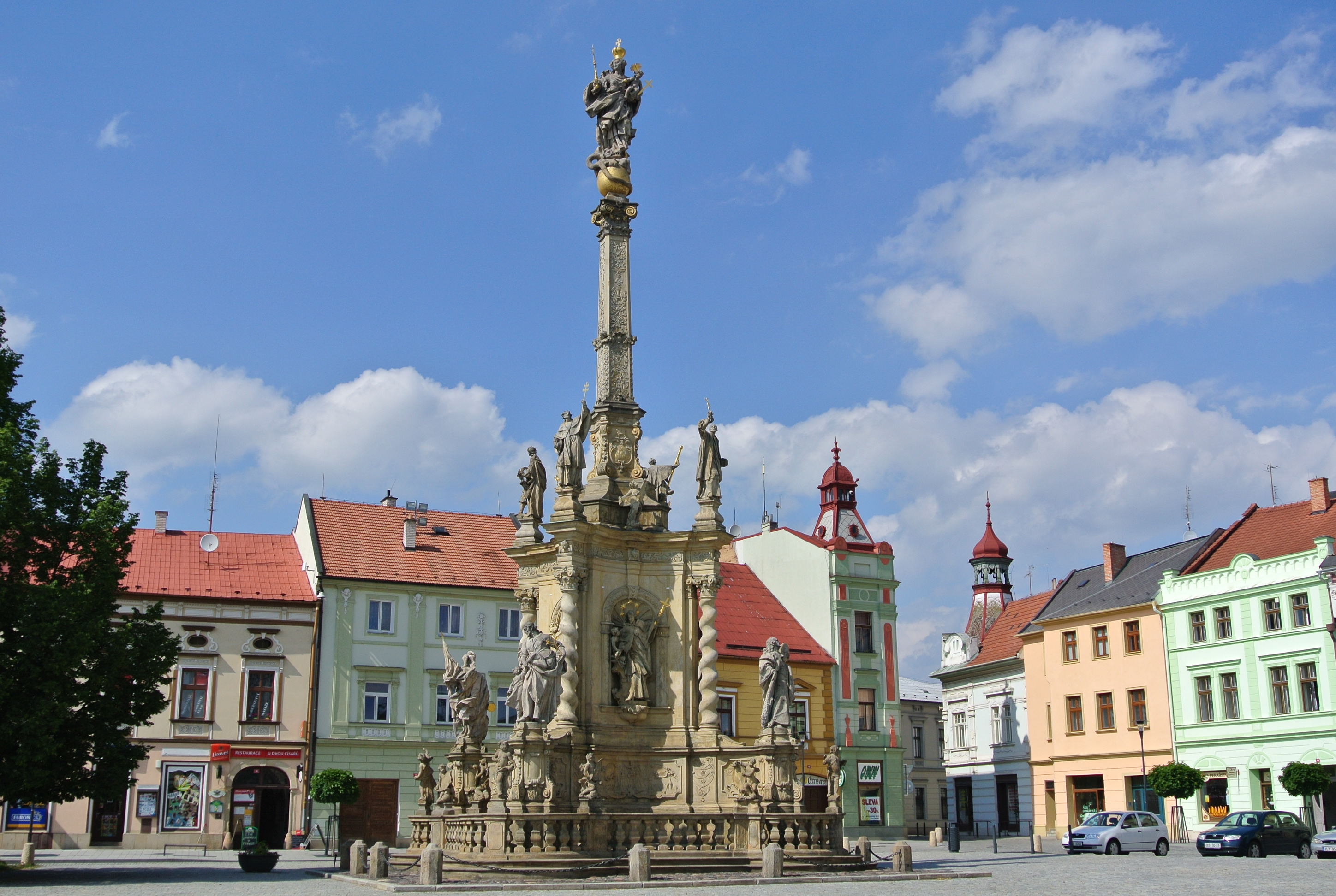 Mariánský barokní sloup, Mariánské náměstí, Uničov